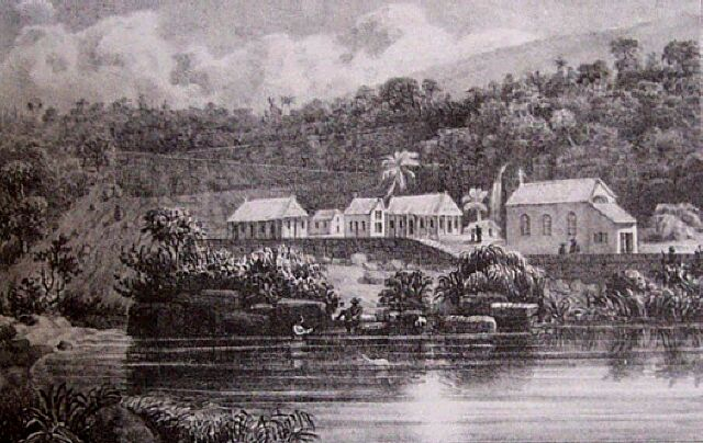 Lithographie d'Antoine Roussin répresentant l'Ilet Bethléem sur l'île de la Réunion